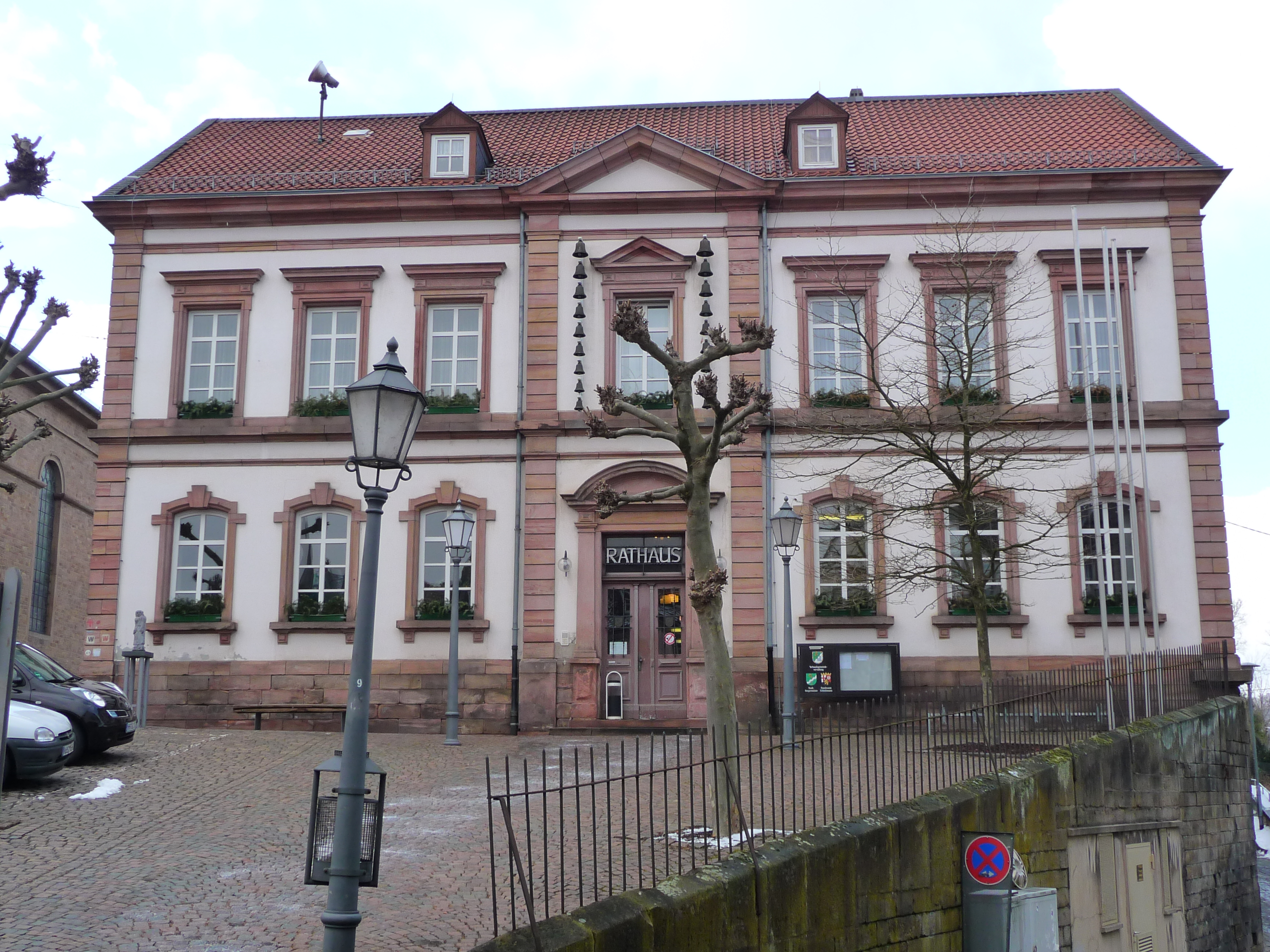 Rathaus von Kusel (Kreis Kusel, Deutschland)